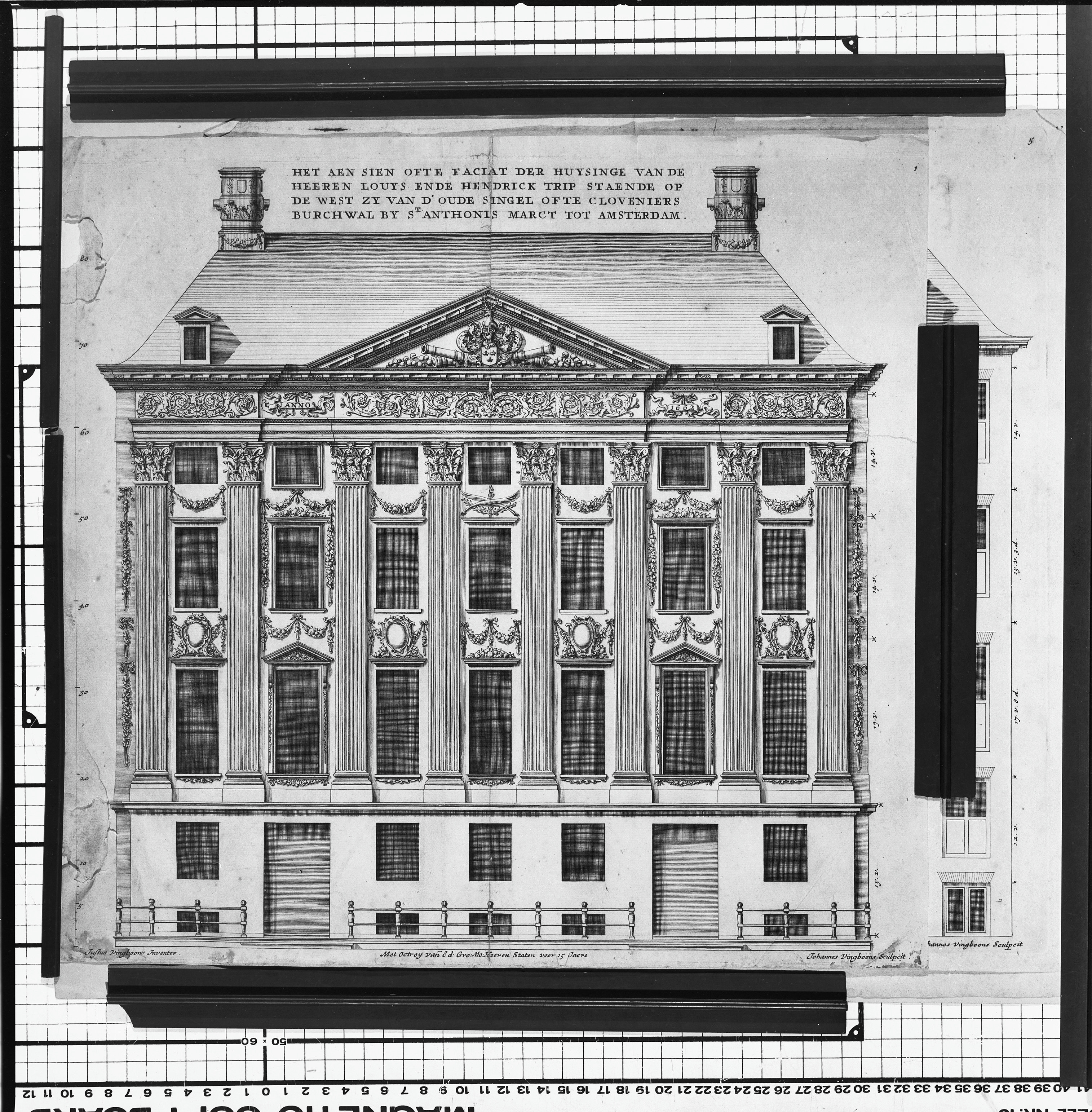 Trippenhuis: gravure van het Trippenhuis in Museum Maarten van Rossum in Zaltbommel